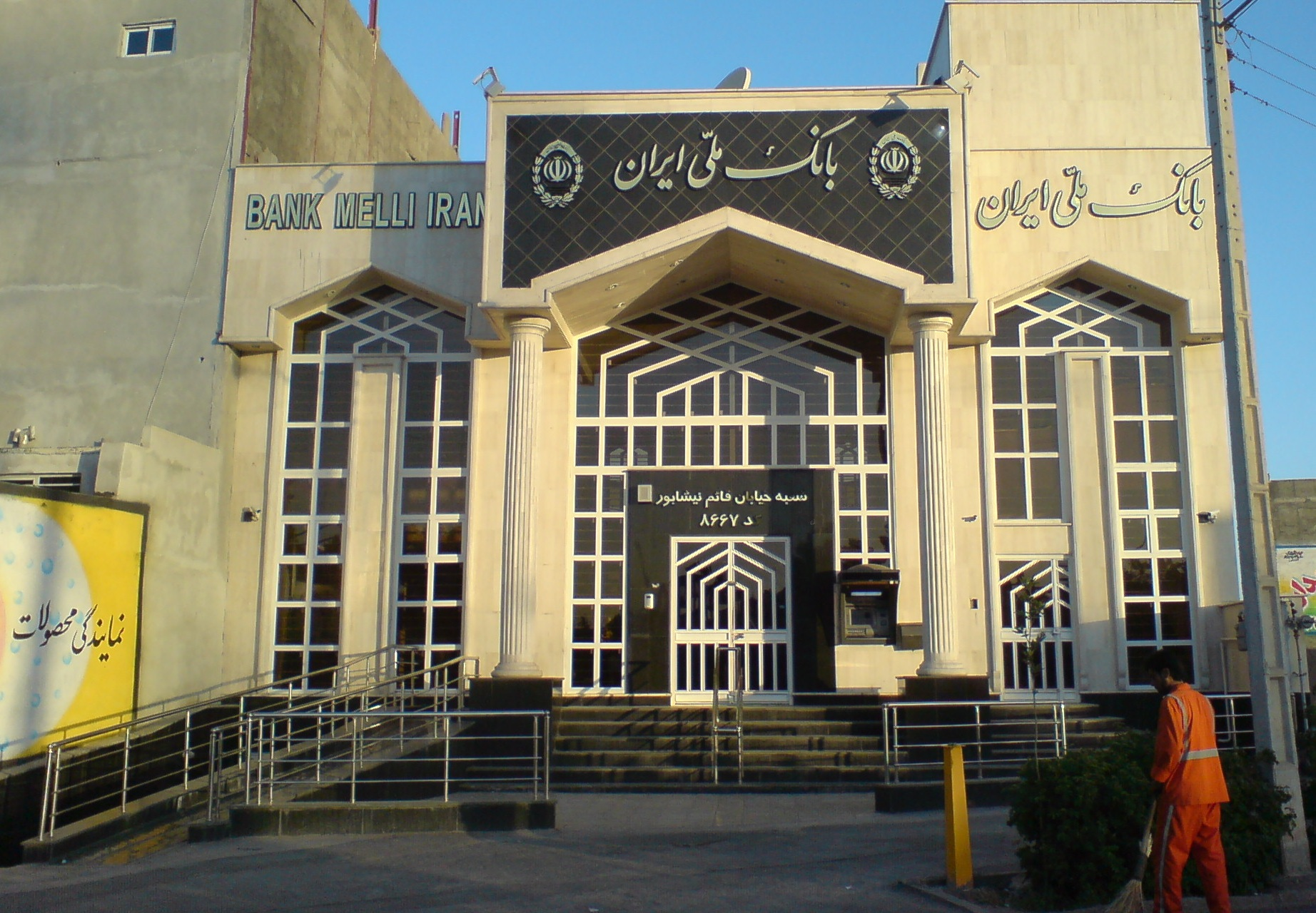 Bank_Melli_Iran_2-Nishapur